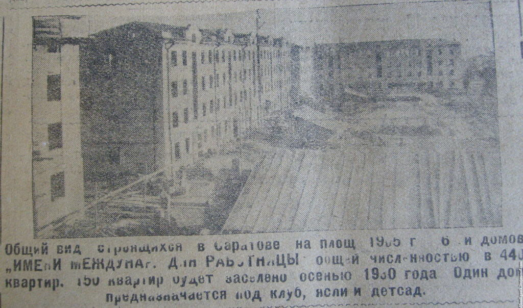 Строительство домов 8 марта в Саратове - из газеты "Поволжская правда"